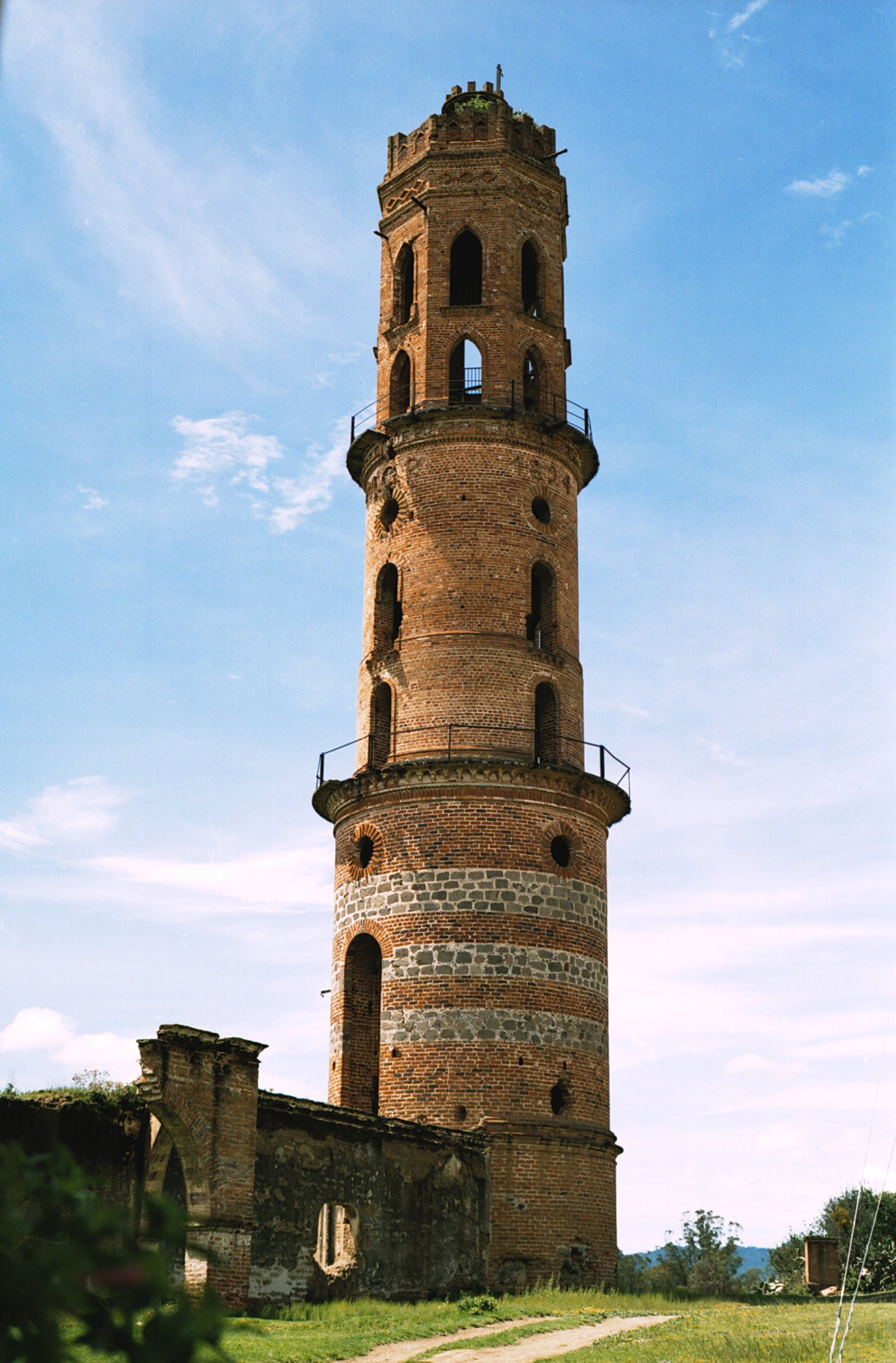 Este torreón forma parte de la Ex Hacienda de Guadalupe, localidad de Juarez Coronaco, municipio de San Matías Tlalancaleca, Puebla, México.